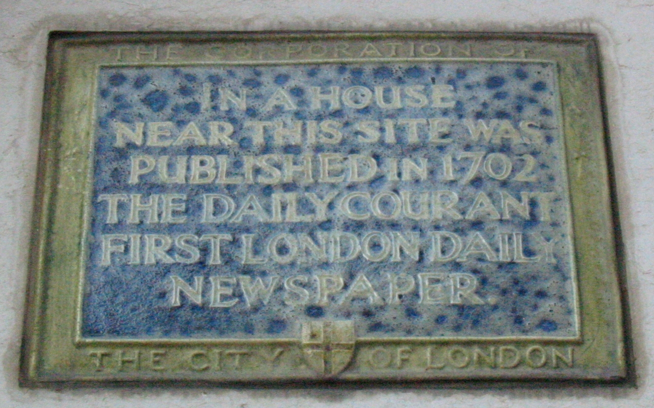 Nrf: Pliaque à Londres